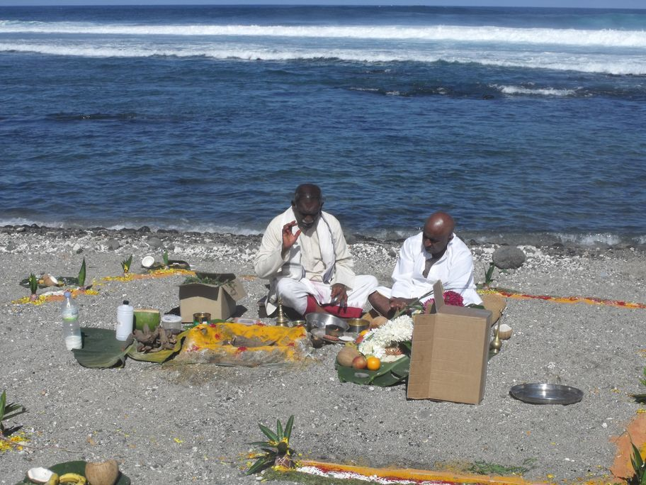 Cérémonie hindou sur la plage de Saint Pierre lieu dit Ravine Blanche le lundi 24 mai 2010.